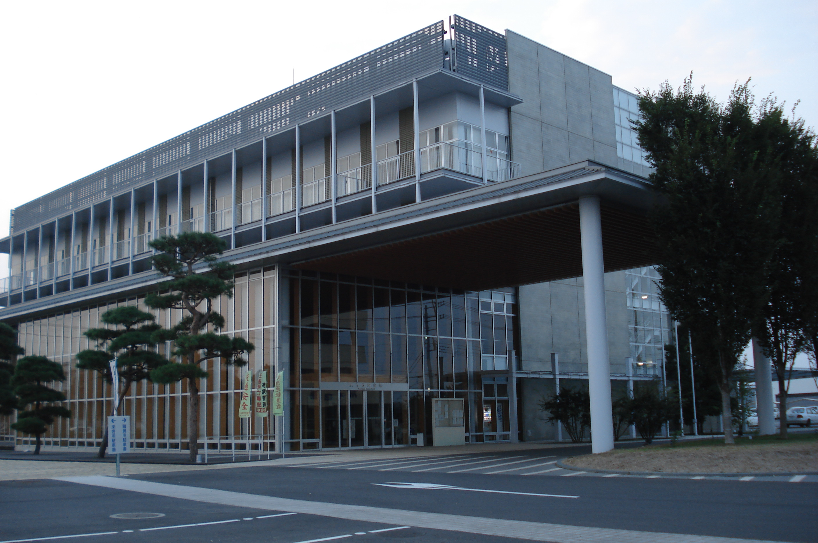 八千代町役場本庁舎 茨城県結城郡八千代町大字菅谷1170